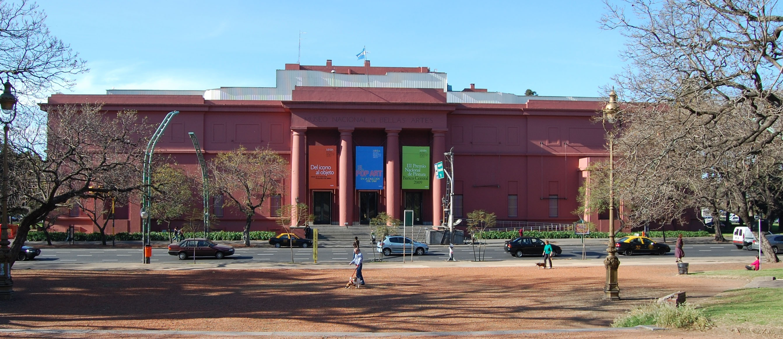 Museo Nacional de Bellas Artes, Buenos Aires, Argentina.